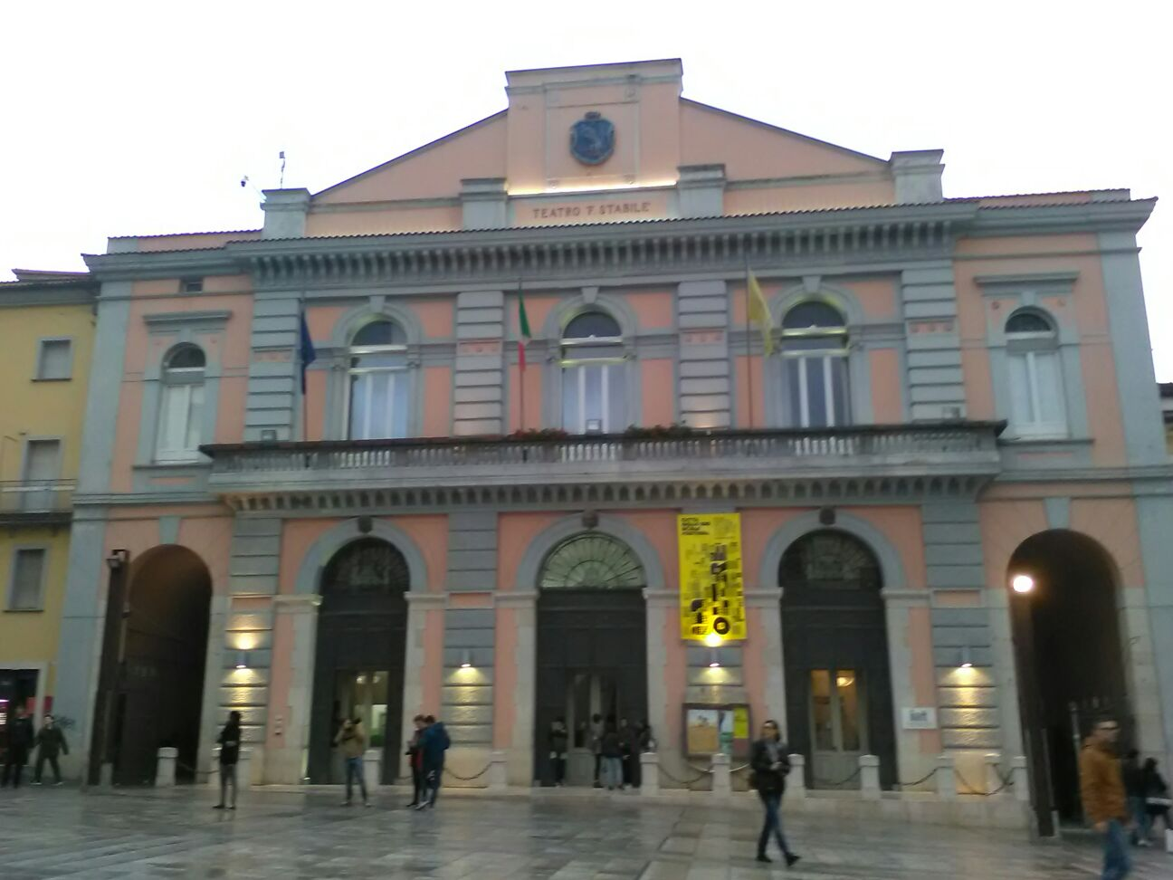 entrata del teatro This is a photo of a monument which is part of cultural heritage of Italy.